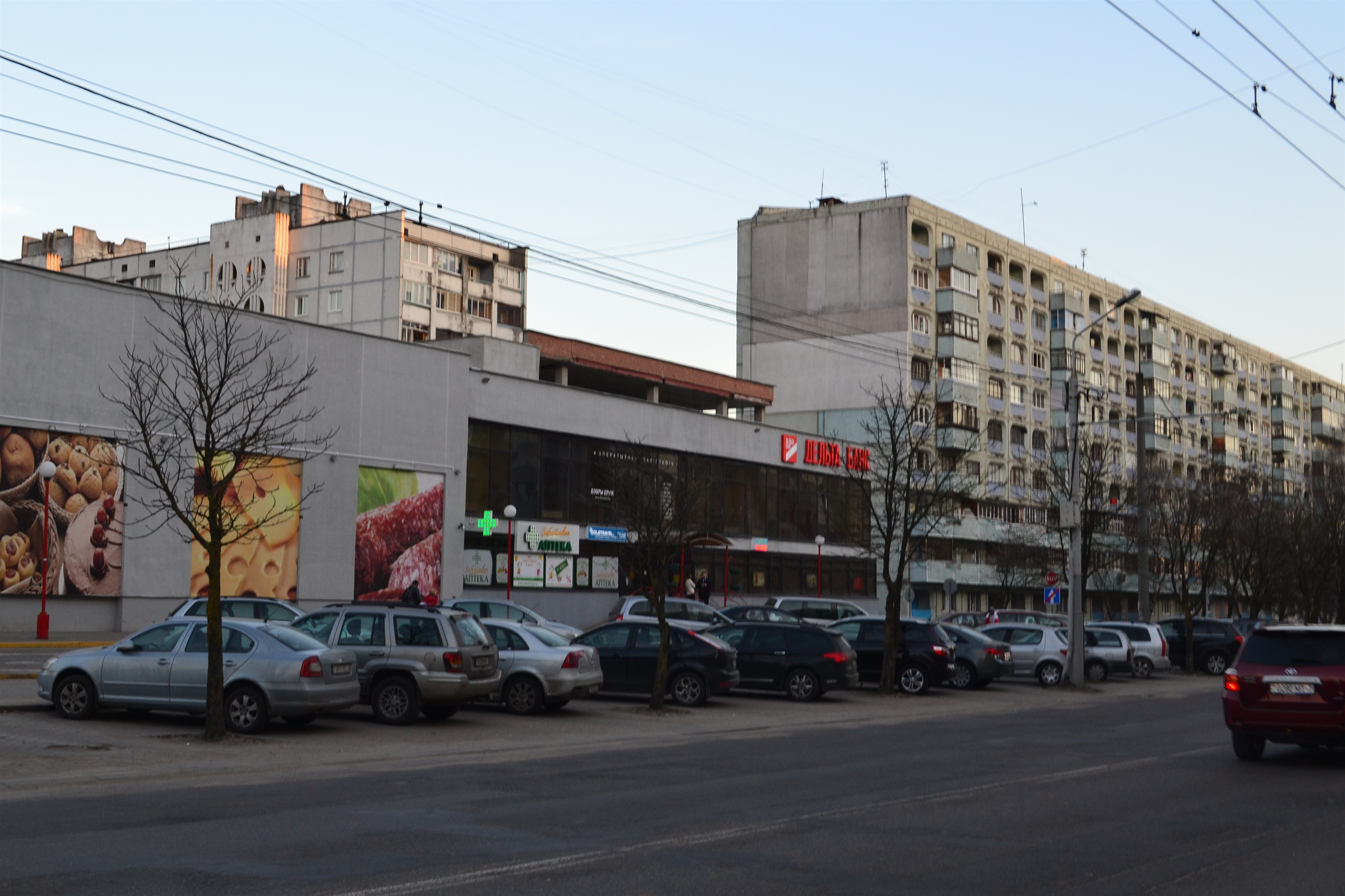 Беларуская (тарашкевіца): Будынак з шыльдай Дэльта Банку на вуліцы Бельскага ў Менску